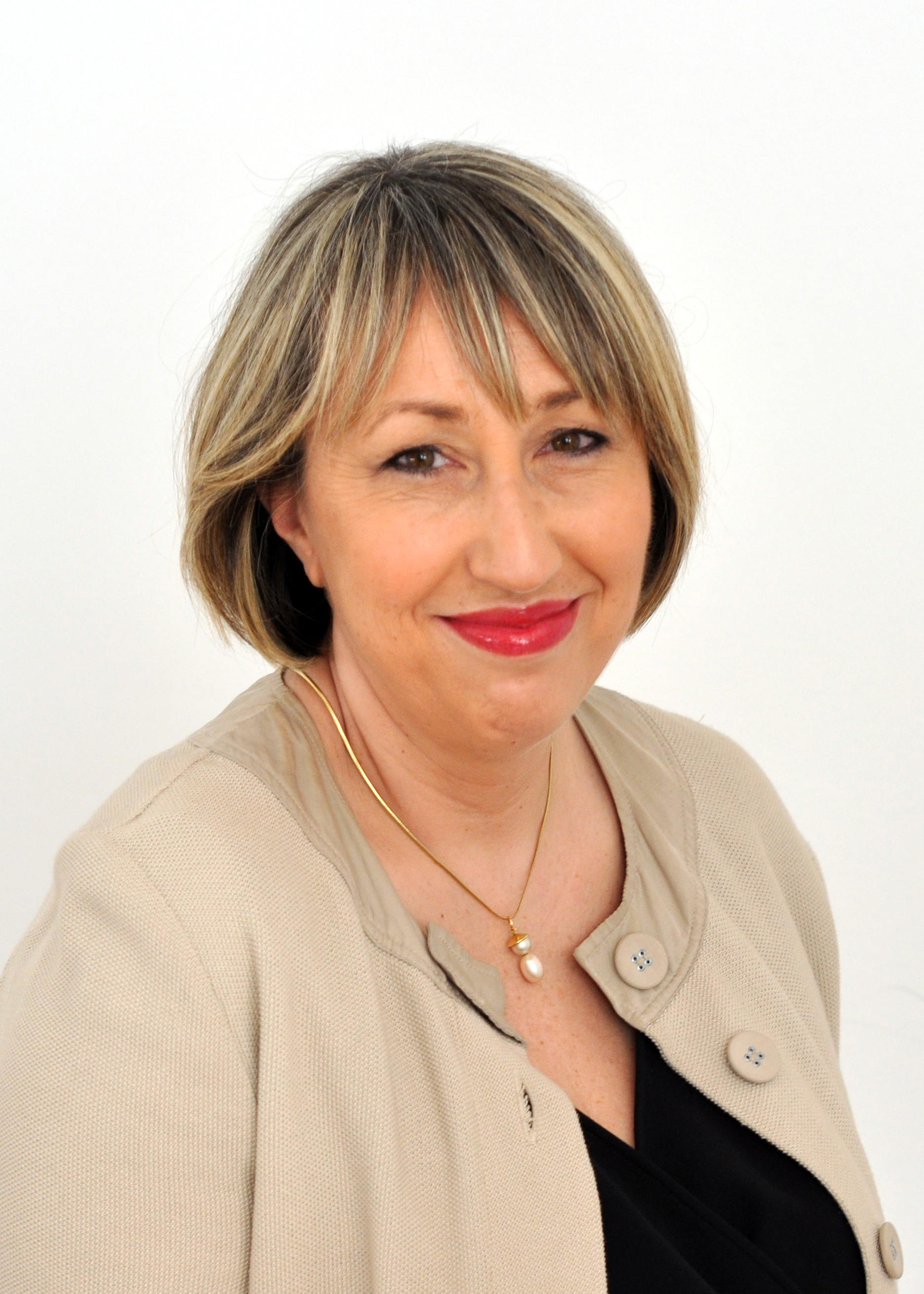 Aragonés: Recadrage de la Photo officielle par l'équipe de Marie-Anne Montchamp, candidate UMP dans la 4e circonscription des Français établis hors de France, Benelux.